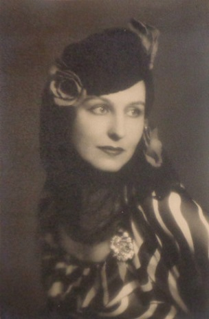 Isa Bluette